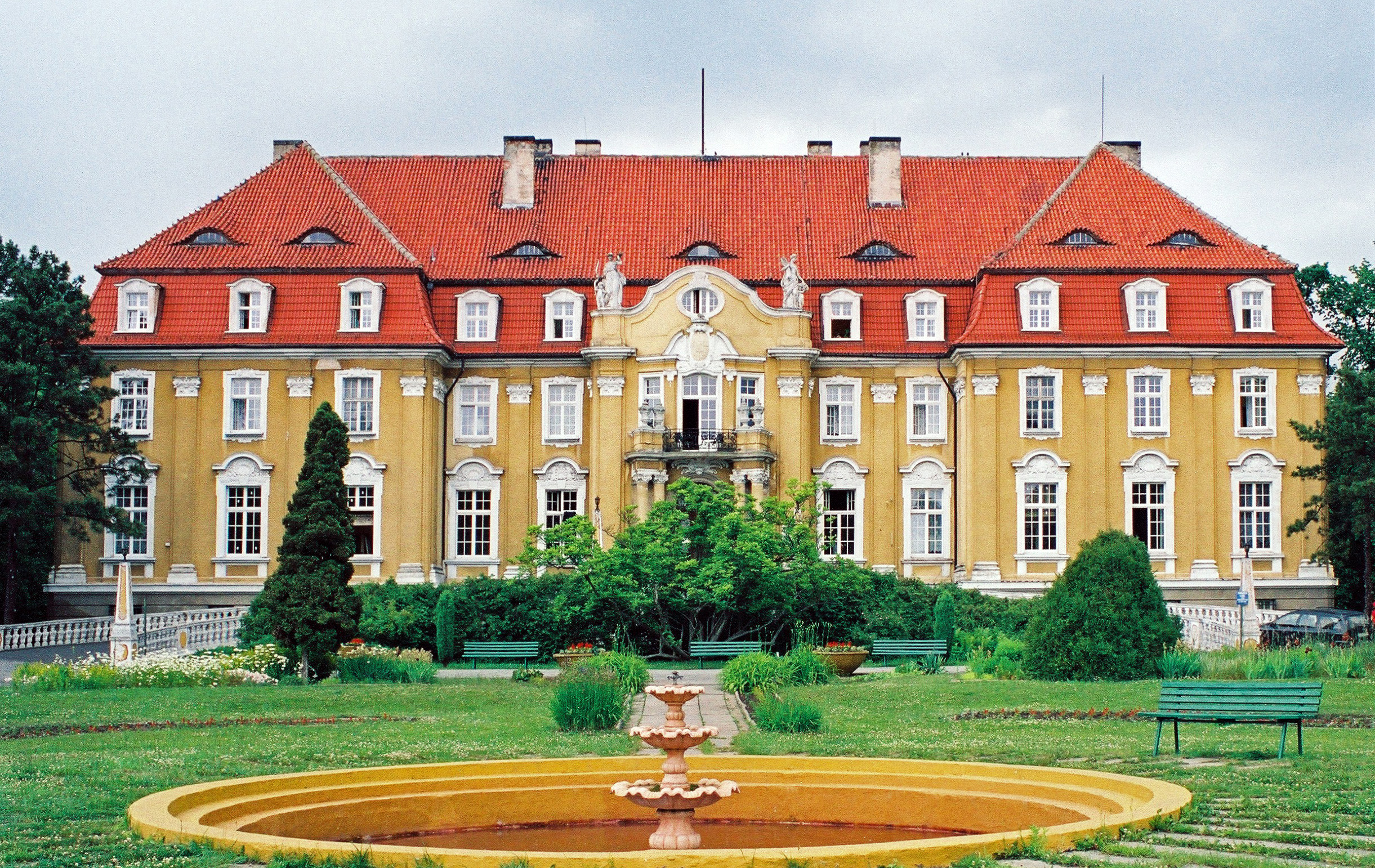 Pałac w Kochcicach